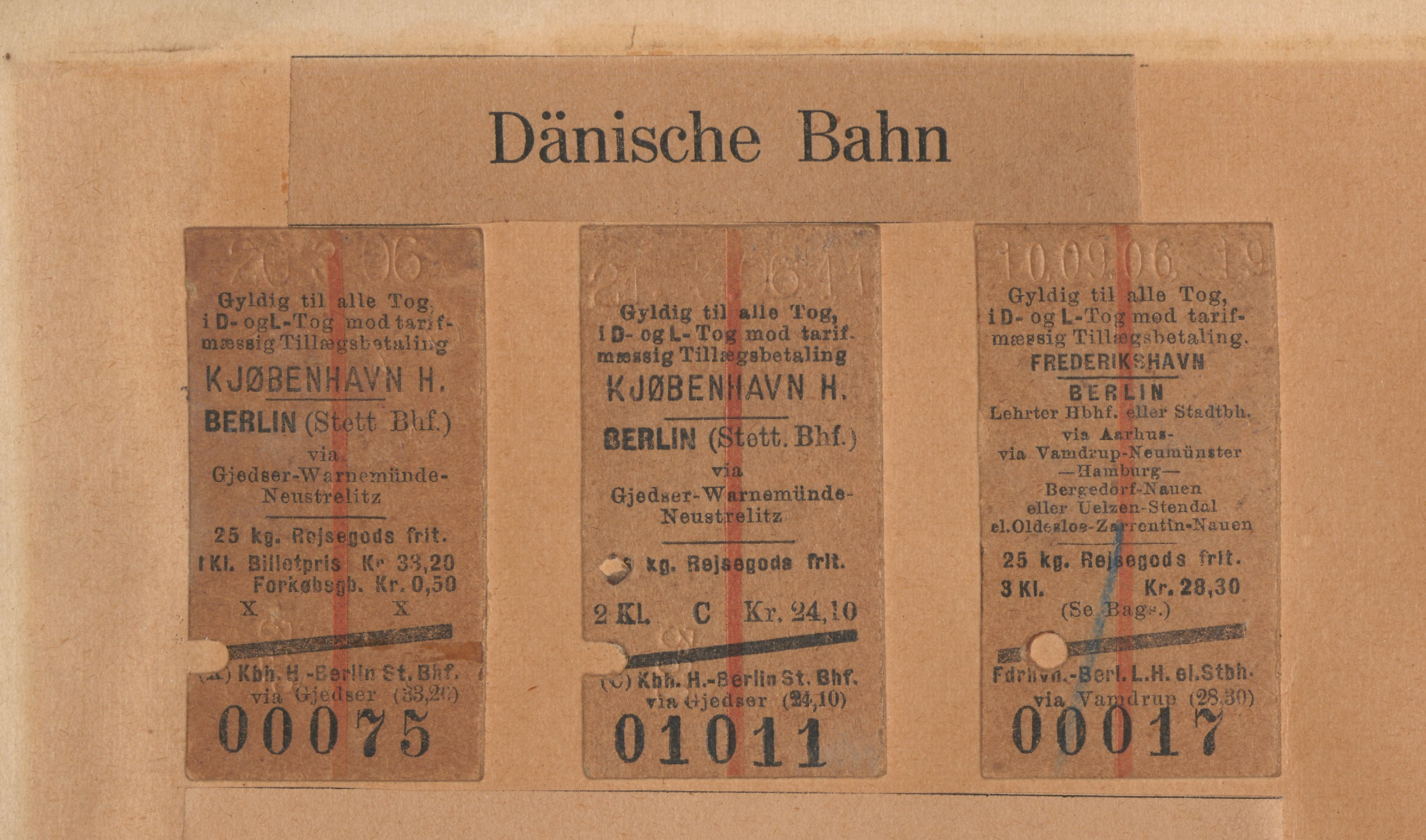 Fahrkarten der Dänischen Bahn aus dem Jahr 1906. Die Tableaus mit Eisenbahnfahrkarten wurden von dem Sammler und Opernsänger Fritz Hellmuth zwischen dem Ende des 19. Jahrhunderts bis ca. 1925 erstellt. Hierfür sammelte er weltweit auf eigenen Reisen Fahrkarten oder ließ sich diese von den Eisenbahngesellschaften zuschicken. Die Sammlung wurde 1926 vom Berliner Verkehrs- und Baumuseum übernommen und ist heute im Historischen Archiv der Stiftung Deutsches Technikmuseum Berlin zugänglich.